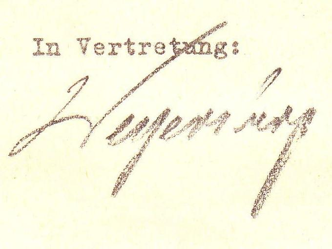 Anklageschrift des Oberreichsanwalts beim Volksgerichtshof zum Strafverfahren gegen Hans Scholl, Sophie Scholl und Christoph Probst vom 21. Februar 1943